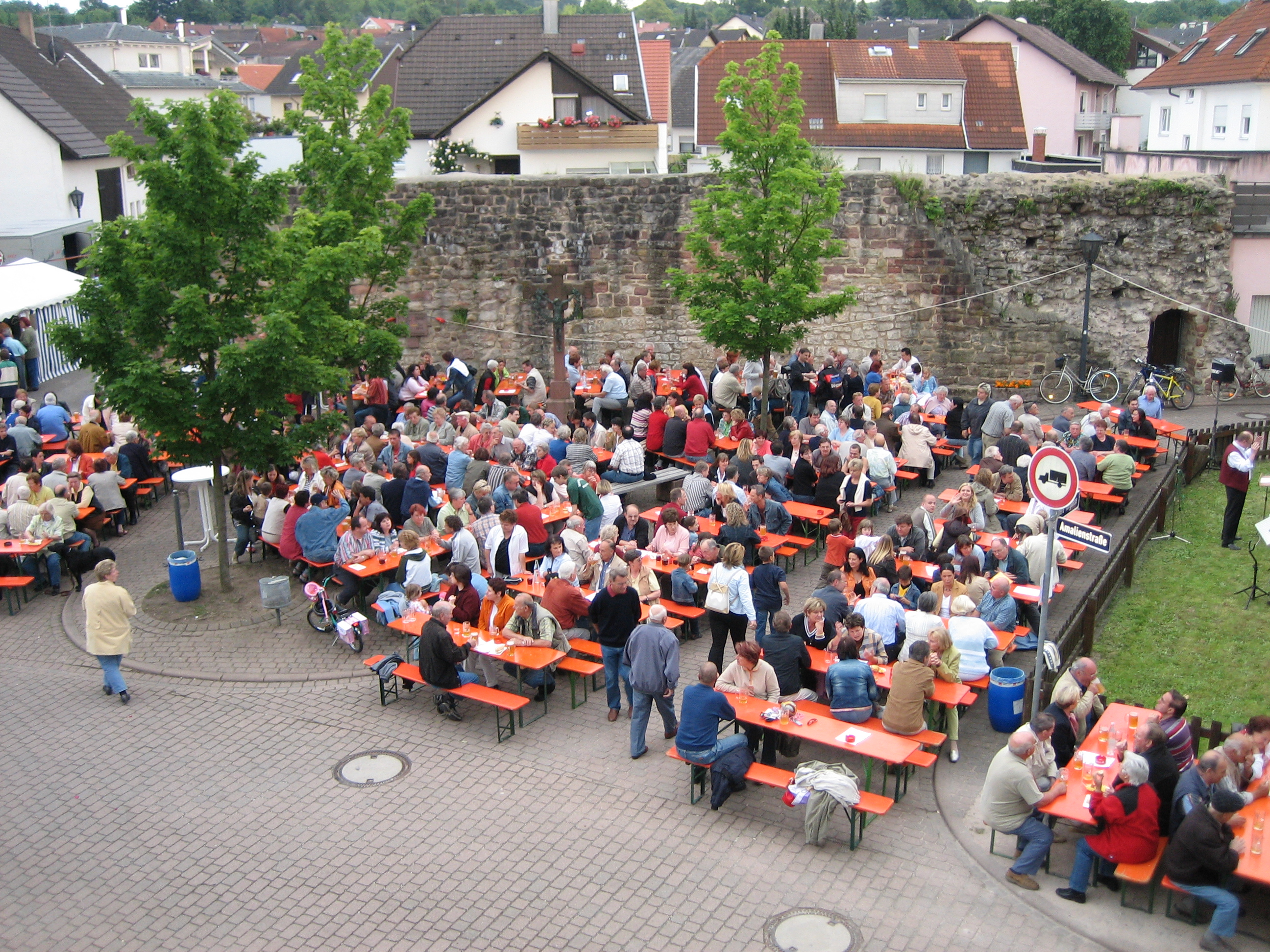 Der Obere Torplatz als Veranstaltungsort in Kuppenheim